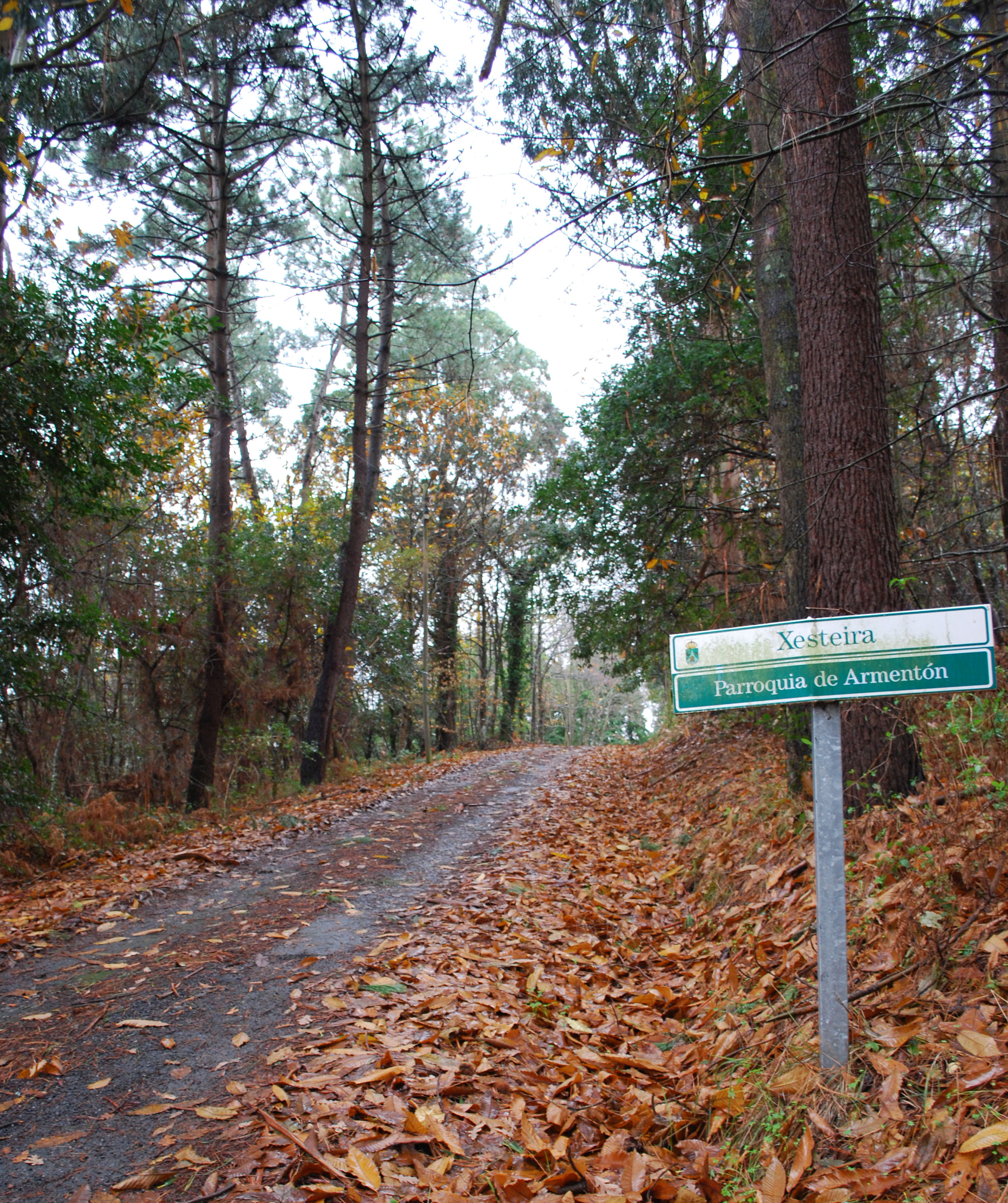 Acceso a Xesteira Armentón Arteixo A Coruña Galiza Spain